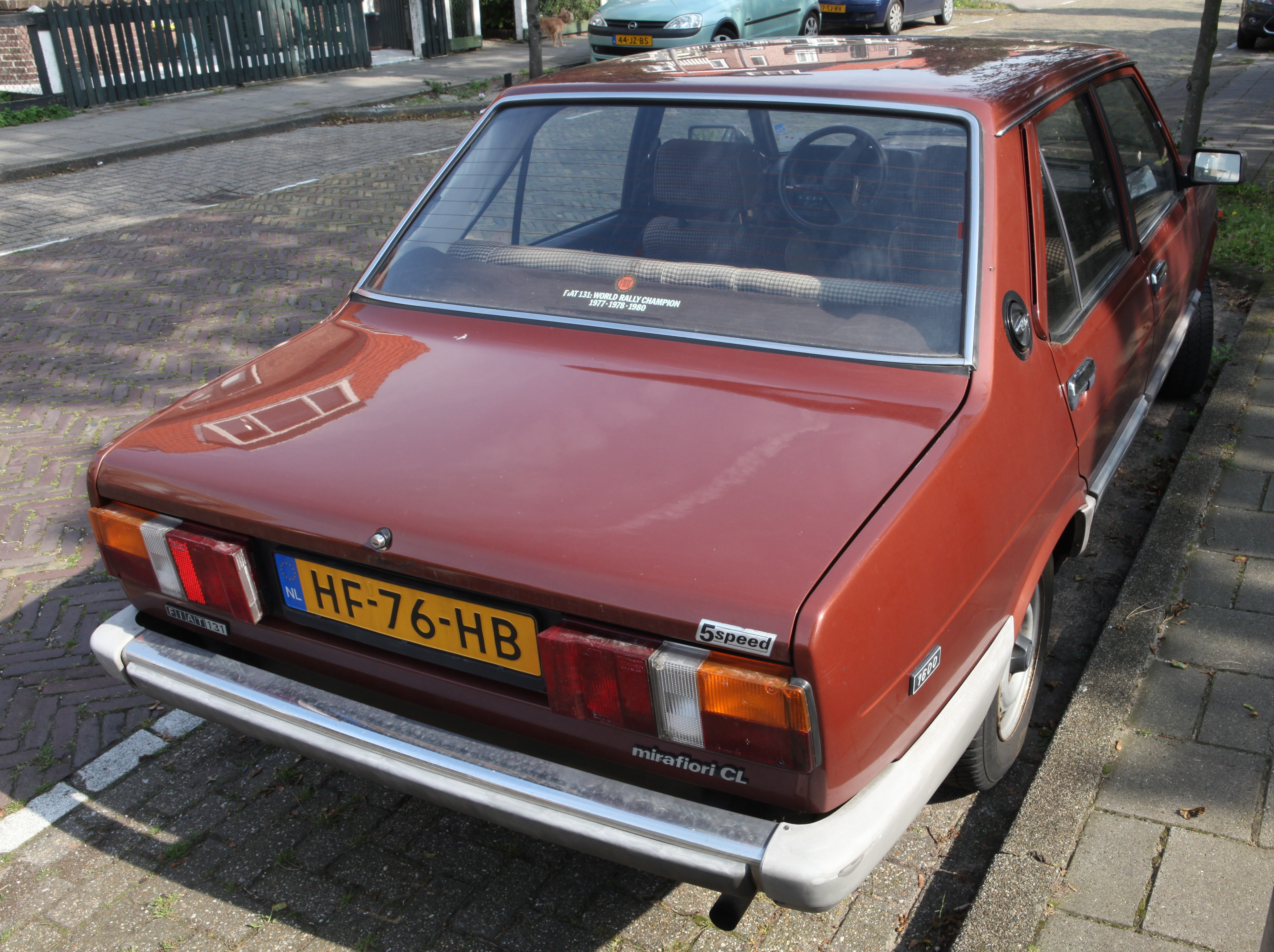 Fiat 131 Mirafiori CL 1600